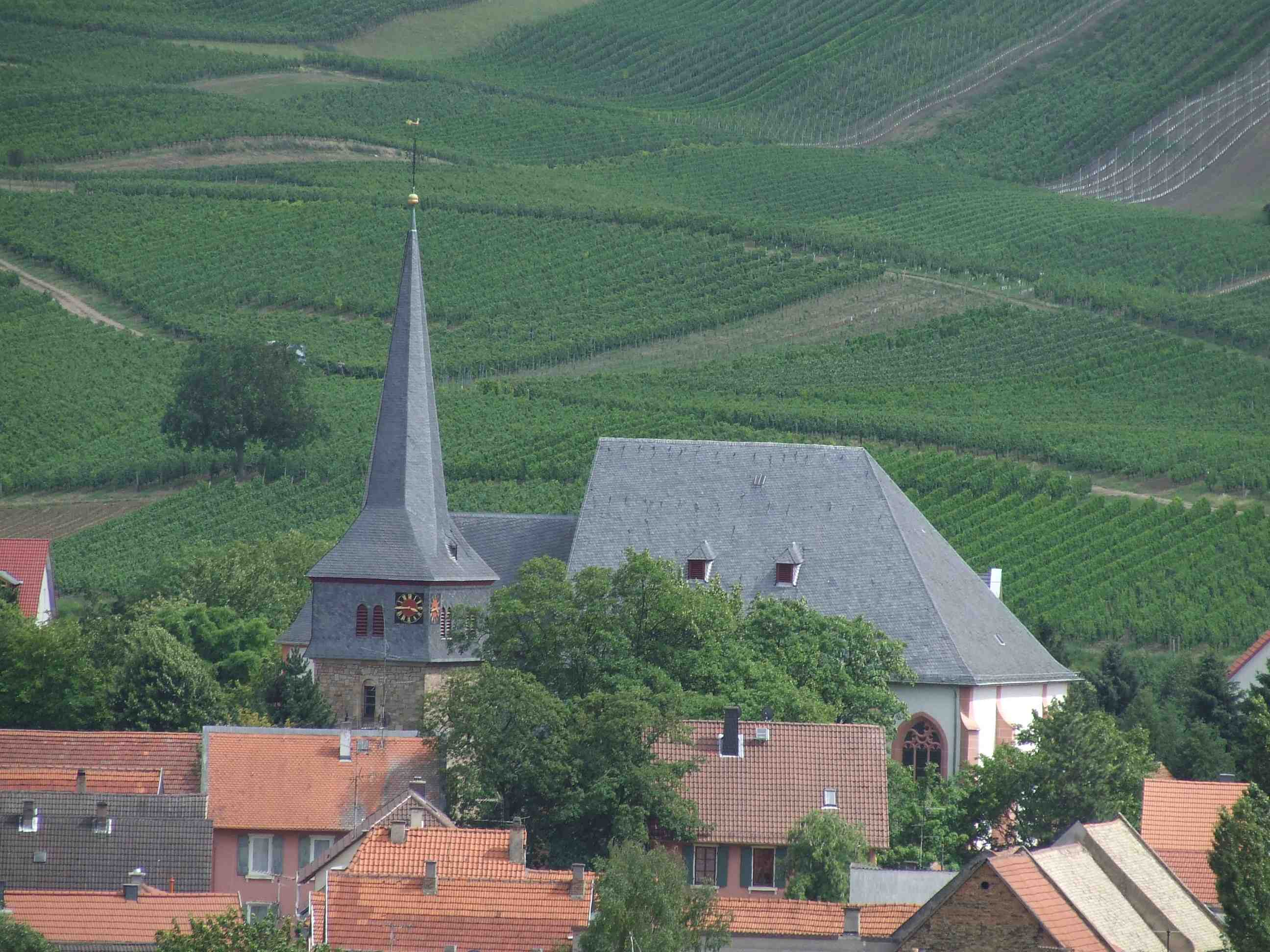 Simultankirche in Bechtolsheim